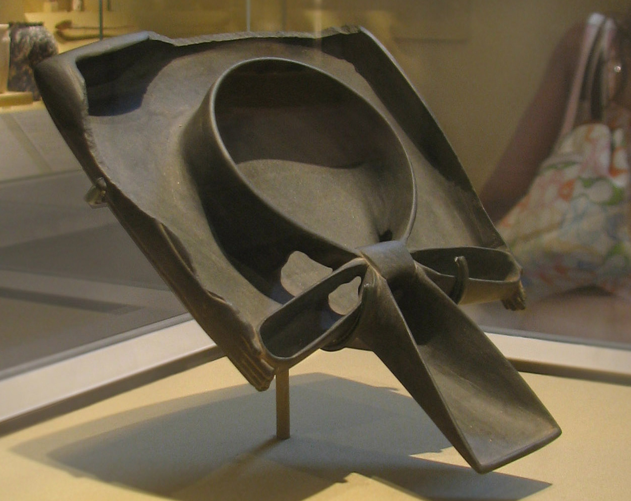 Plateau à offrande égyptien associant les sigles Ka et Ânkh (vie et énergie vitale). Période protodynastique. Metropolitan Museum of Art de New-York.